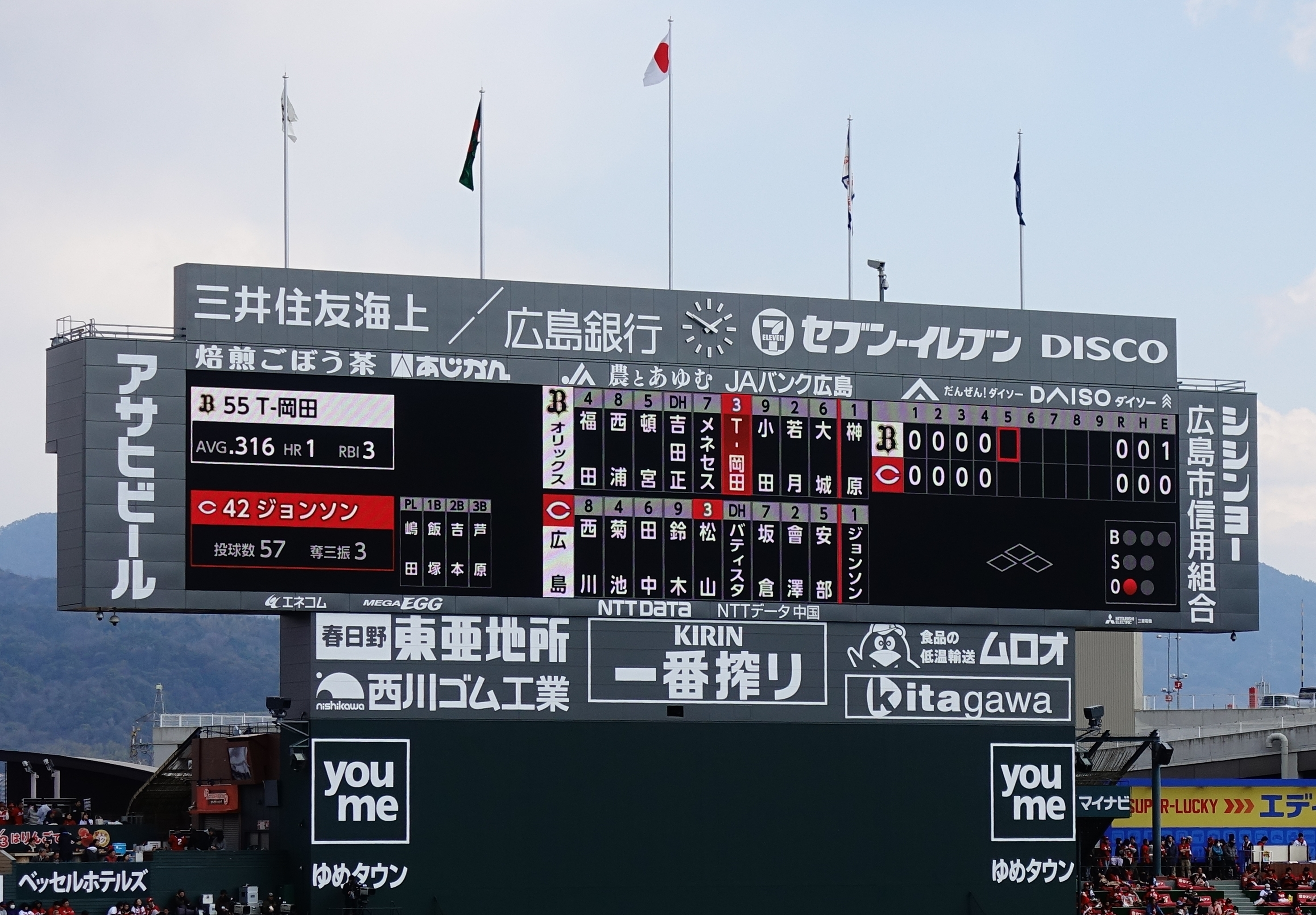 2019年3月17日、広島市民球場（マツダスタジアム）２階スタンドより本人撮影